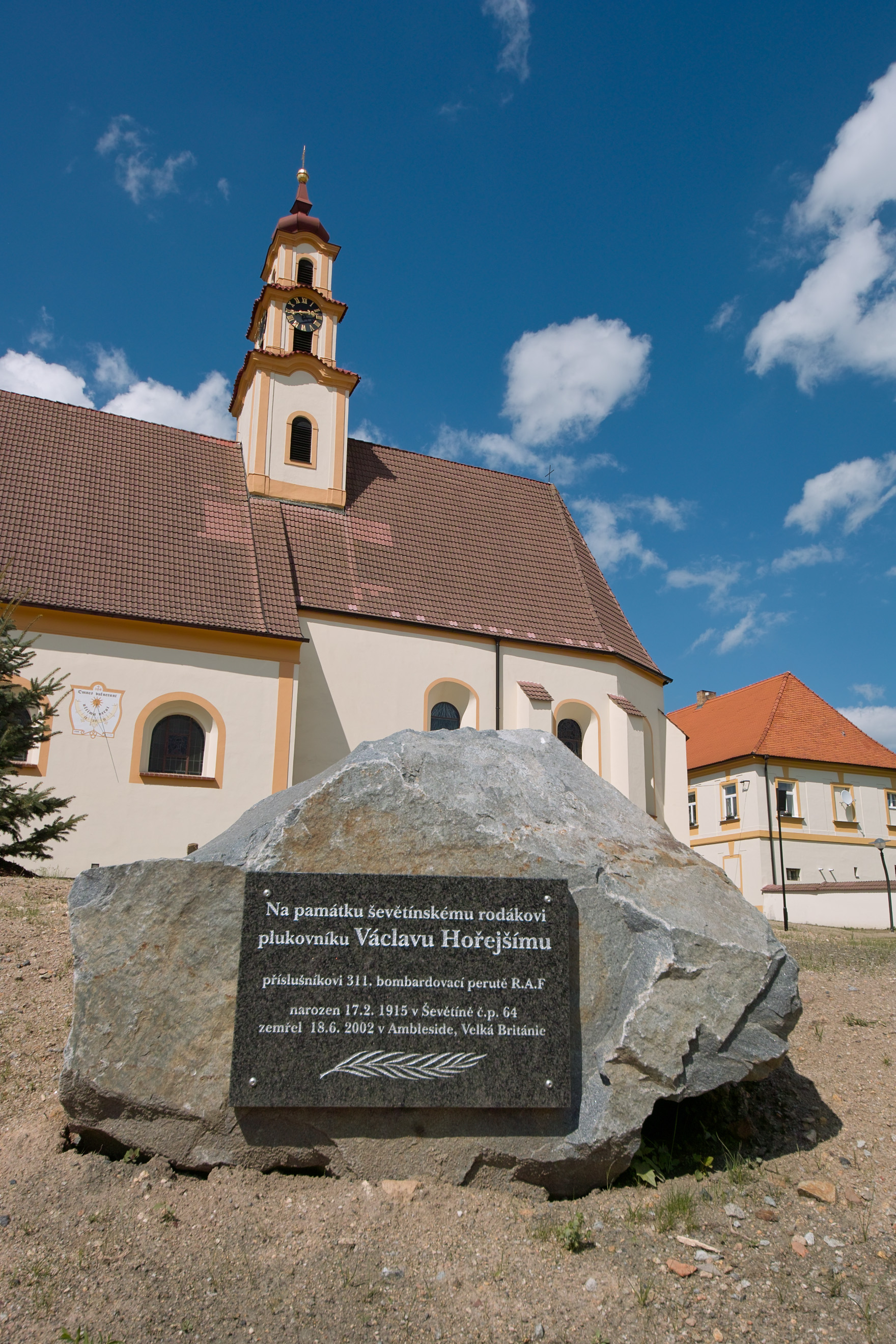 Pomník Václava Hořejšího u kostela svatého Mikuláše.